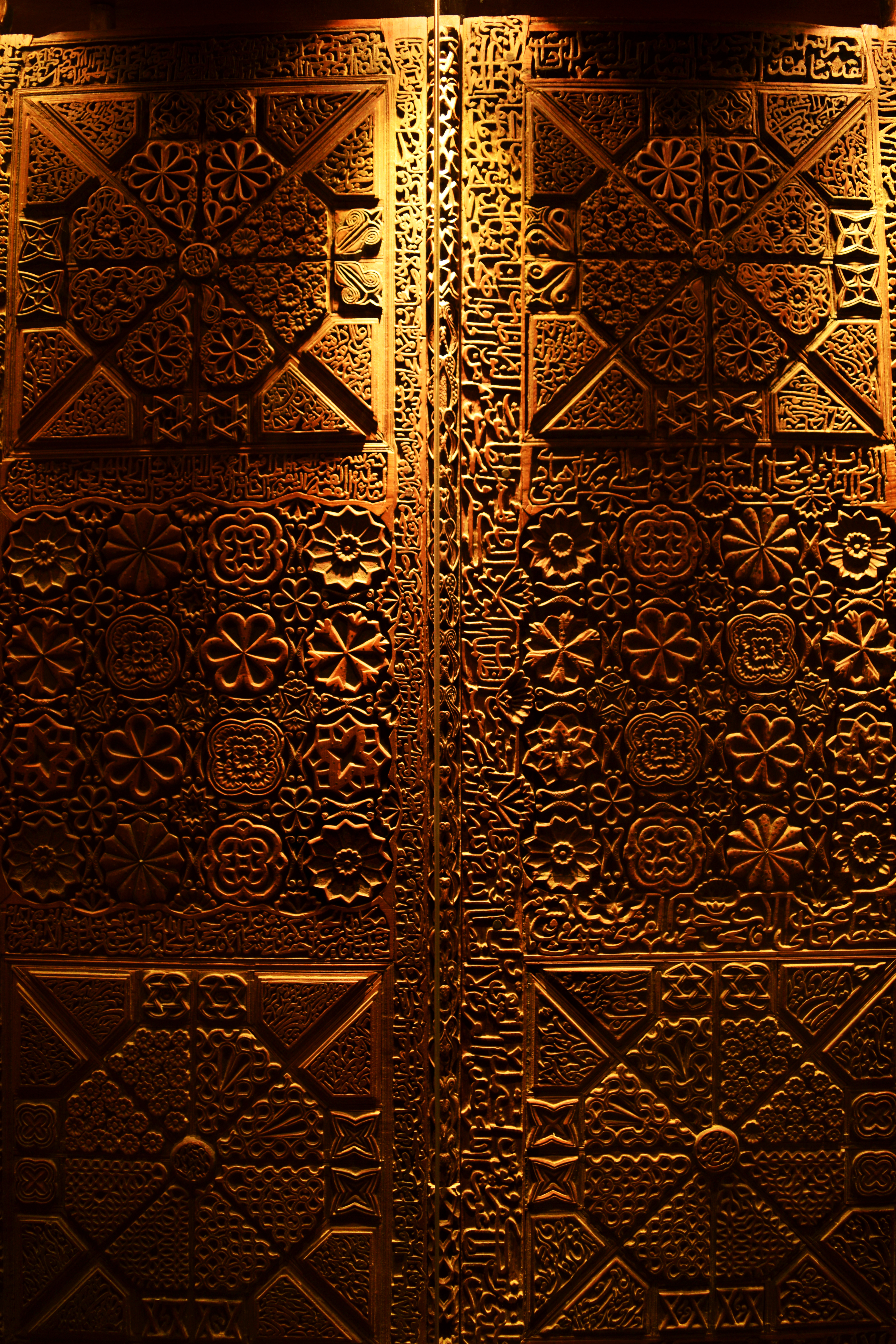 پارک موزه شاهرود